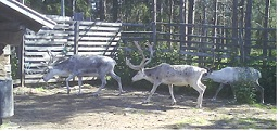 Gällivare skogssameby, Sverige